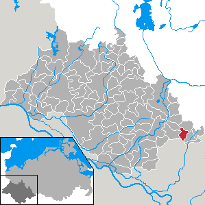 Balow in Mecklenburg-Vorpommern - district Ludwigslust